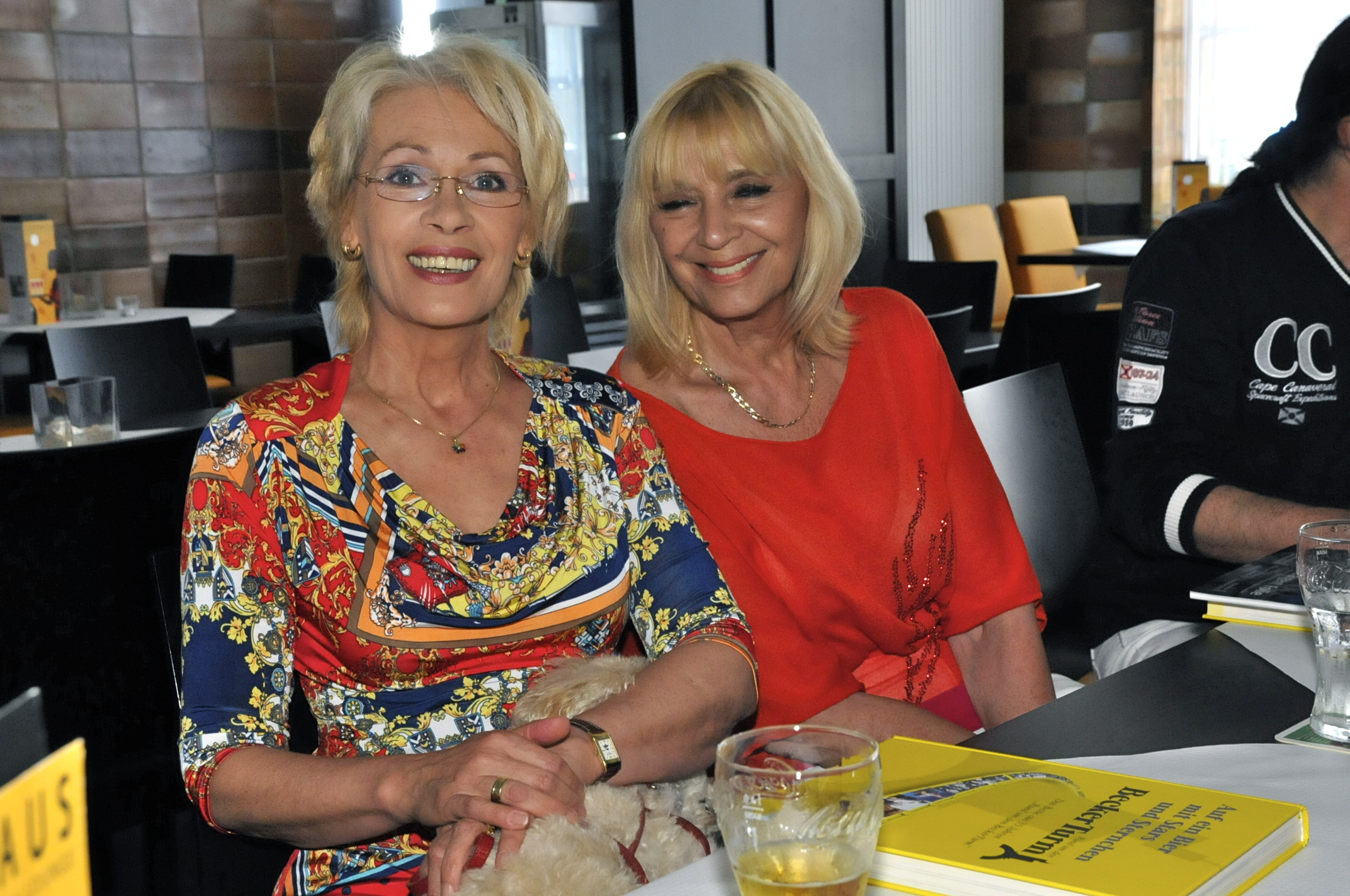 Die Schlagersängerinnen Ingrid Peters und Cindy Berger (Cindy & Bert) während der Buchvorstellung von "Auf ein Bier mit Stars & Sternchen – das Beste aus 35 Jahren RUND UM DEN BECKER TURM".